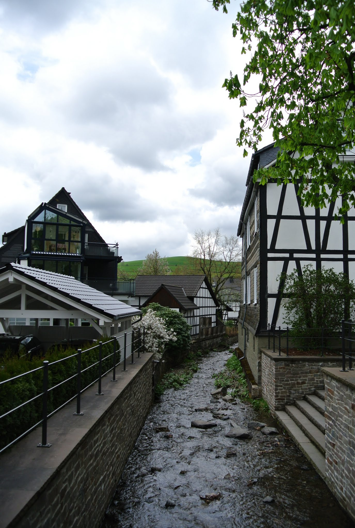 Palme (Fluss) in Bödefeld, 57392 Schmallenberg, Germany